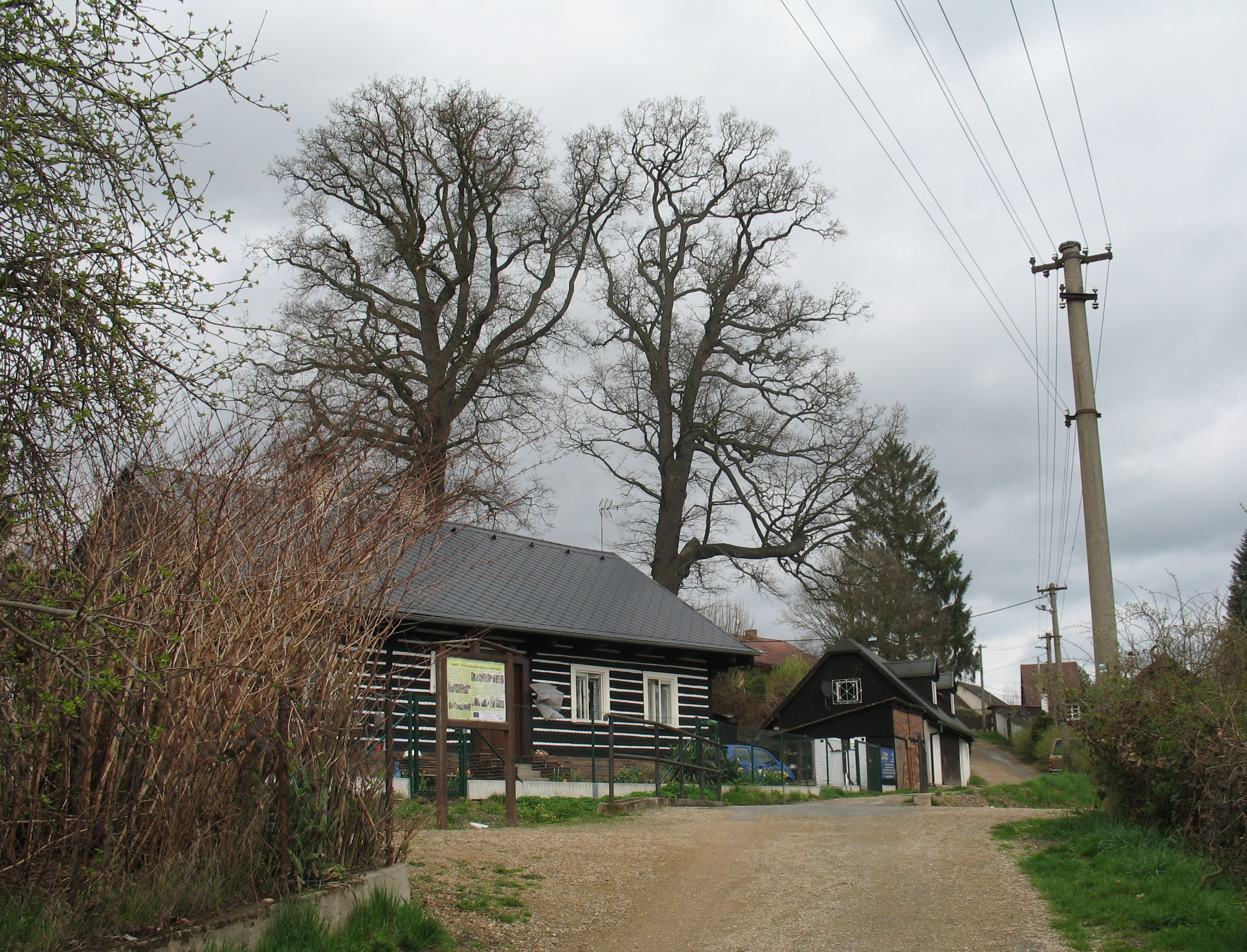 Cesta kolem náhonu. Za roubenkou čp. 32 památkově chráněný dub "U Burýšků"